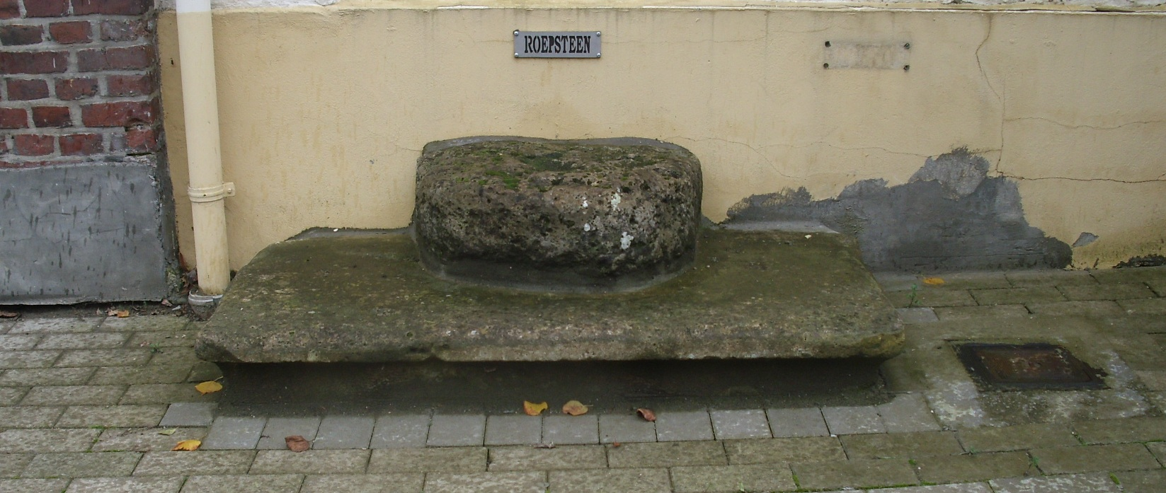 Roepsteen - Sint-Eligiusplein - Leeuwergem - Zottegem - Oost-Vlaanderen - België